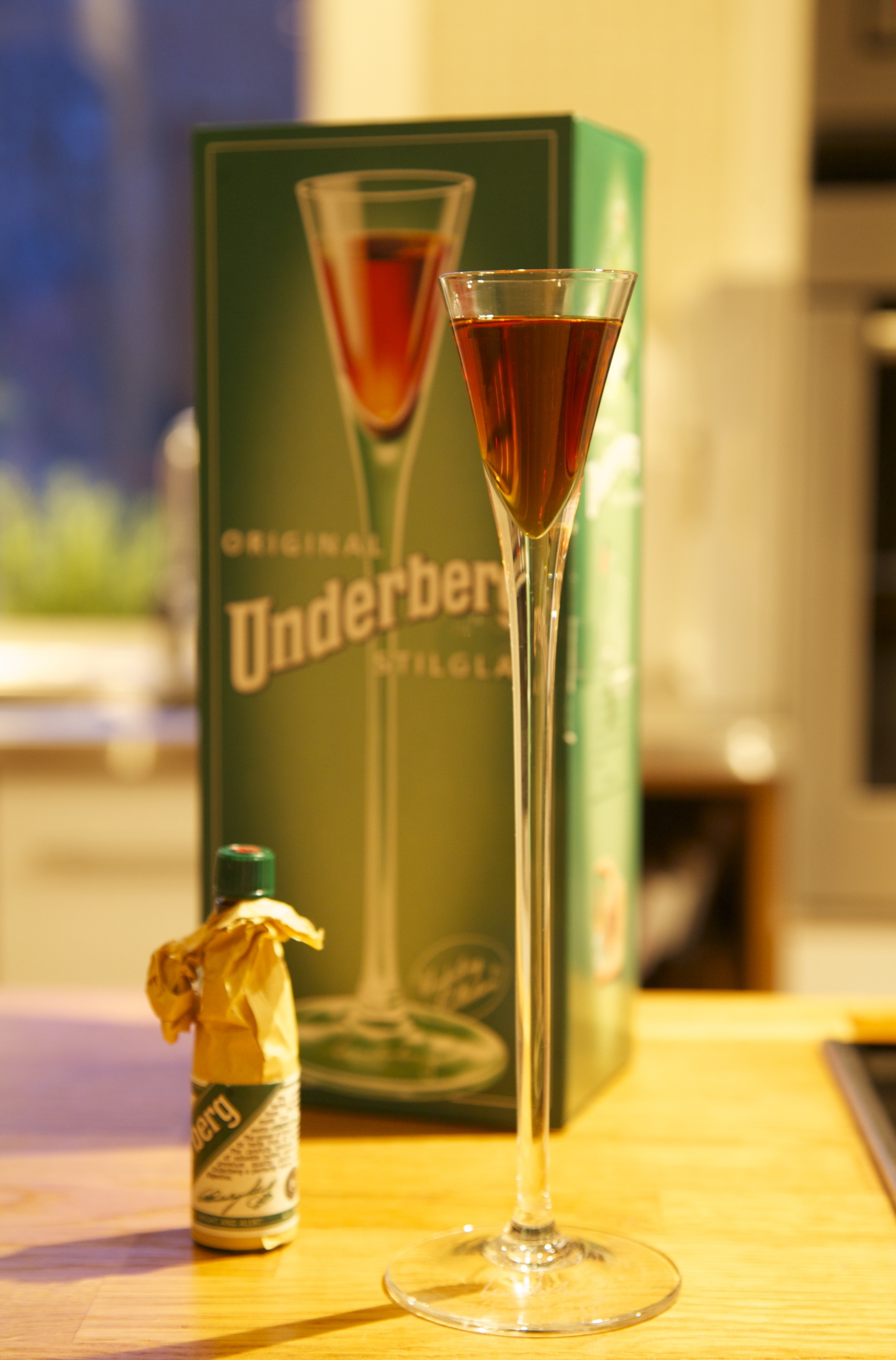 Underberg